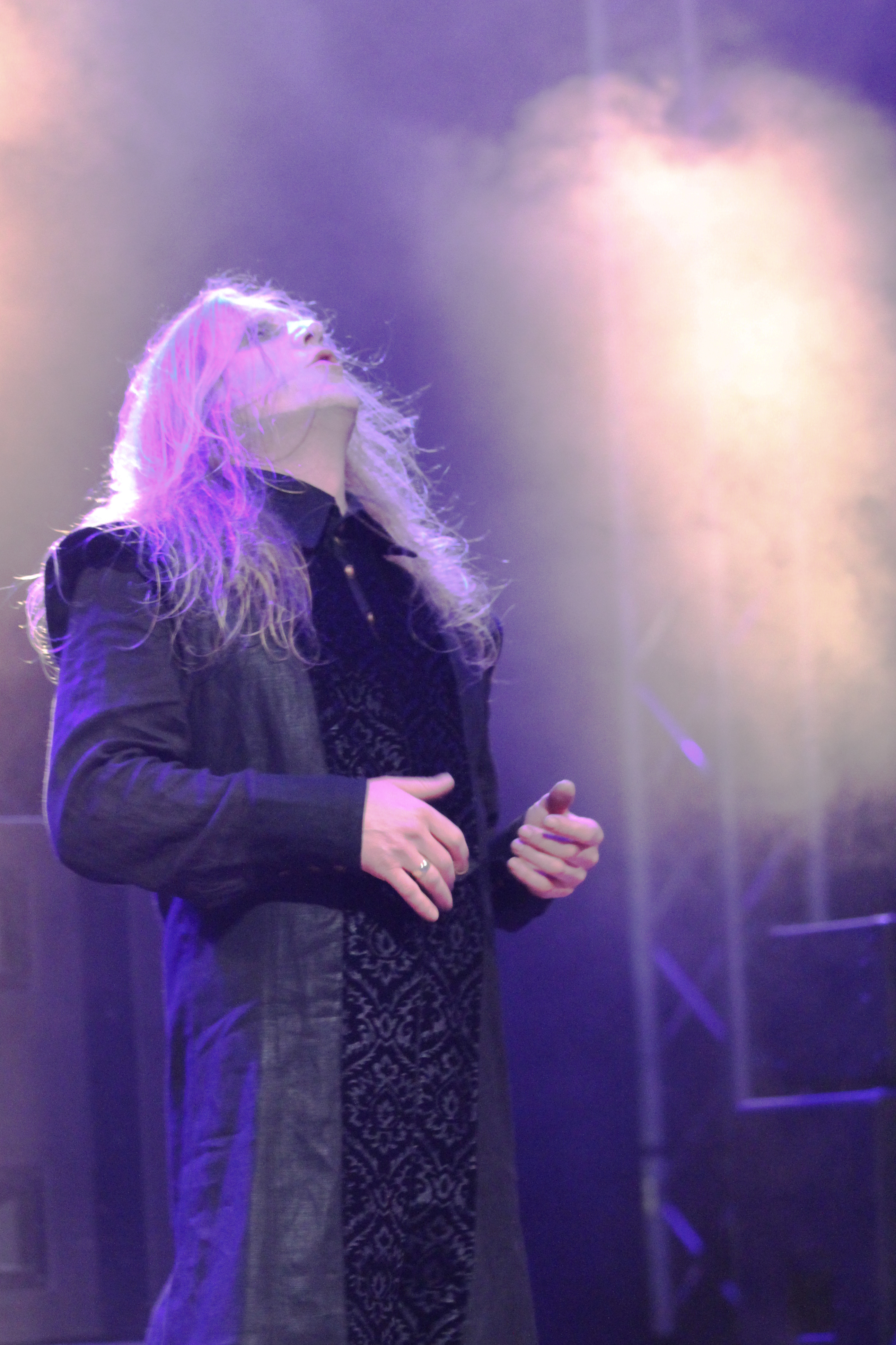 The Vision Bleak auf dem Wave-Gotik-Treffen 2013 in Leipzig, Kohlrabizirkus.